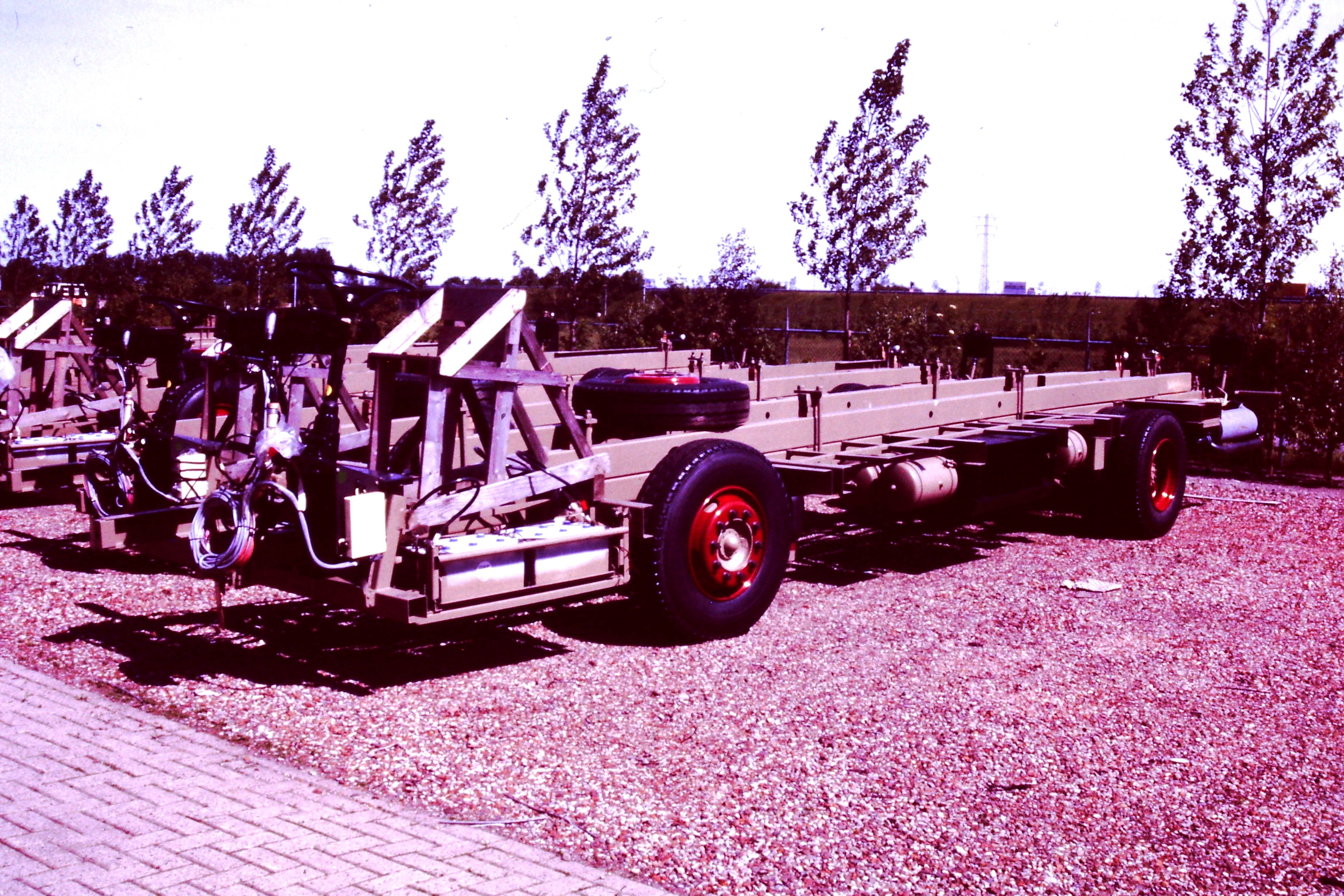 DAF chassis van het type SB201DKDL554.